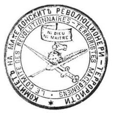 Печат на Женевската група